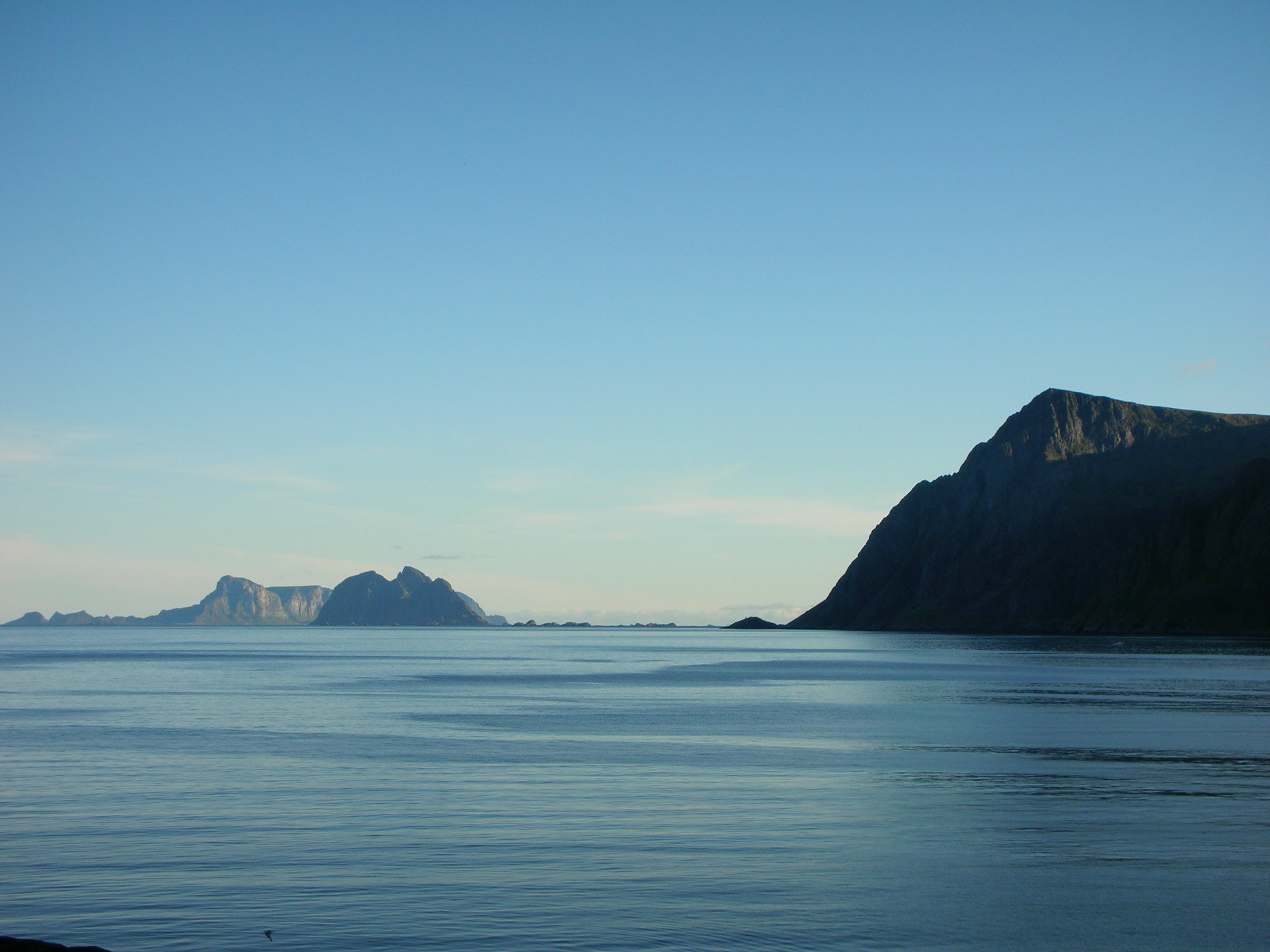 På Lofoturend:Væröy,Mosken og Moskenesöya